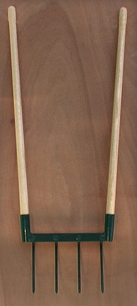 Une fourche à bêcher à 4 dents